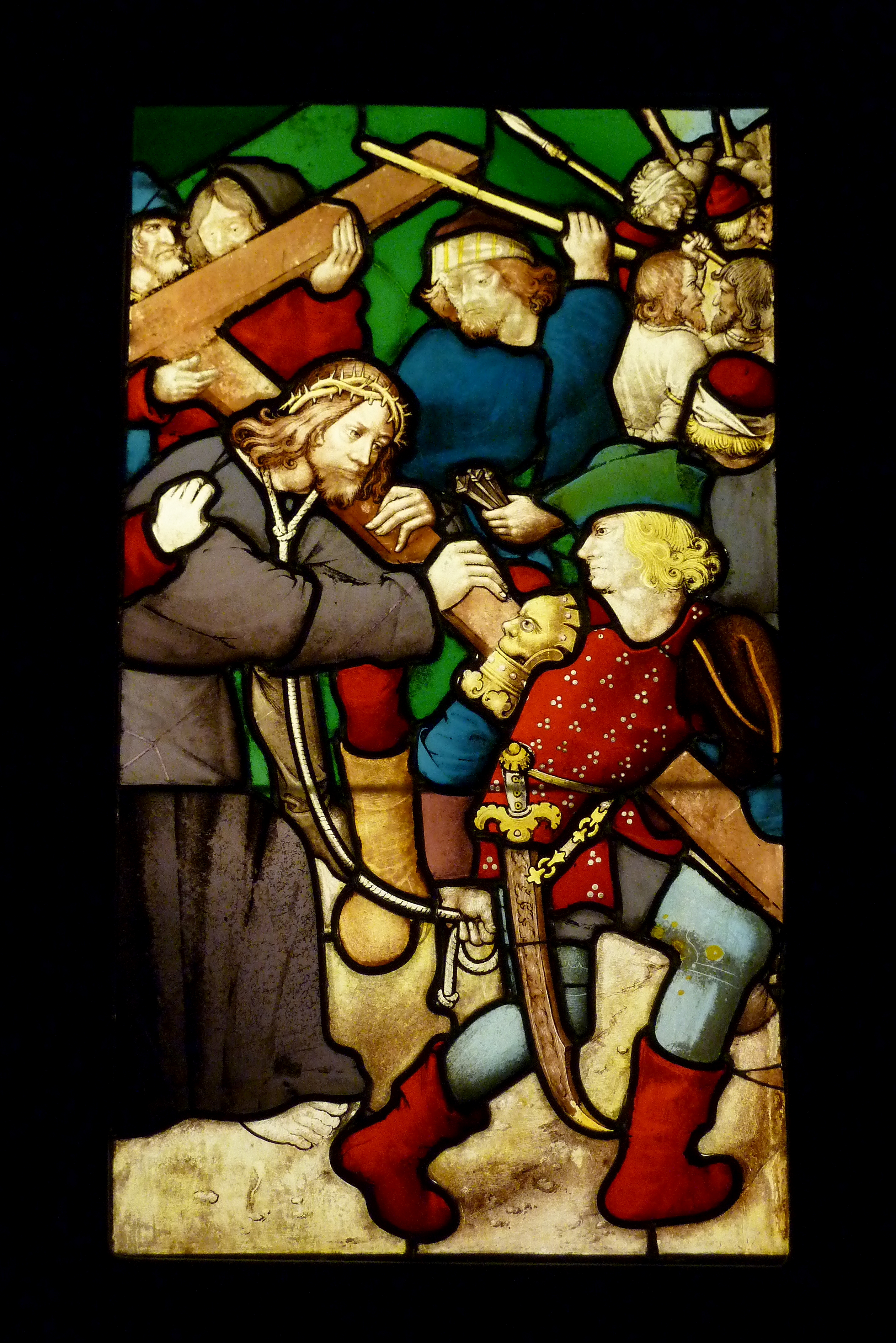 Bleiglasfenster im Musée National du Moyen Âge (Hôtel de Cluny) in Paris; Herkunft: Paris, Kapelle des Hôtel de Cluny, um 1500; Darstellung: Jesus trägt das Kreuz